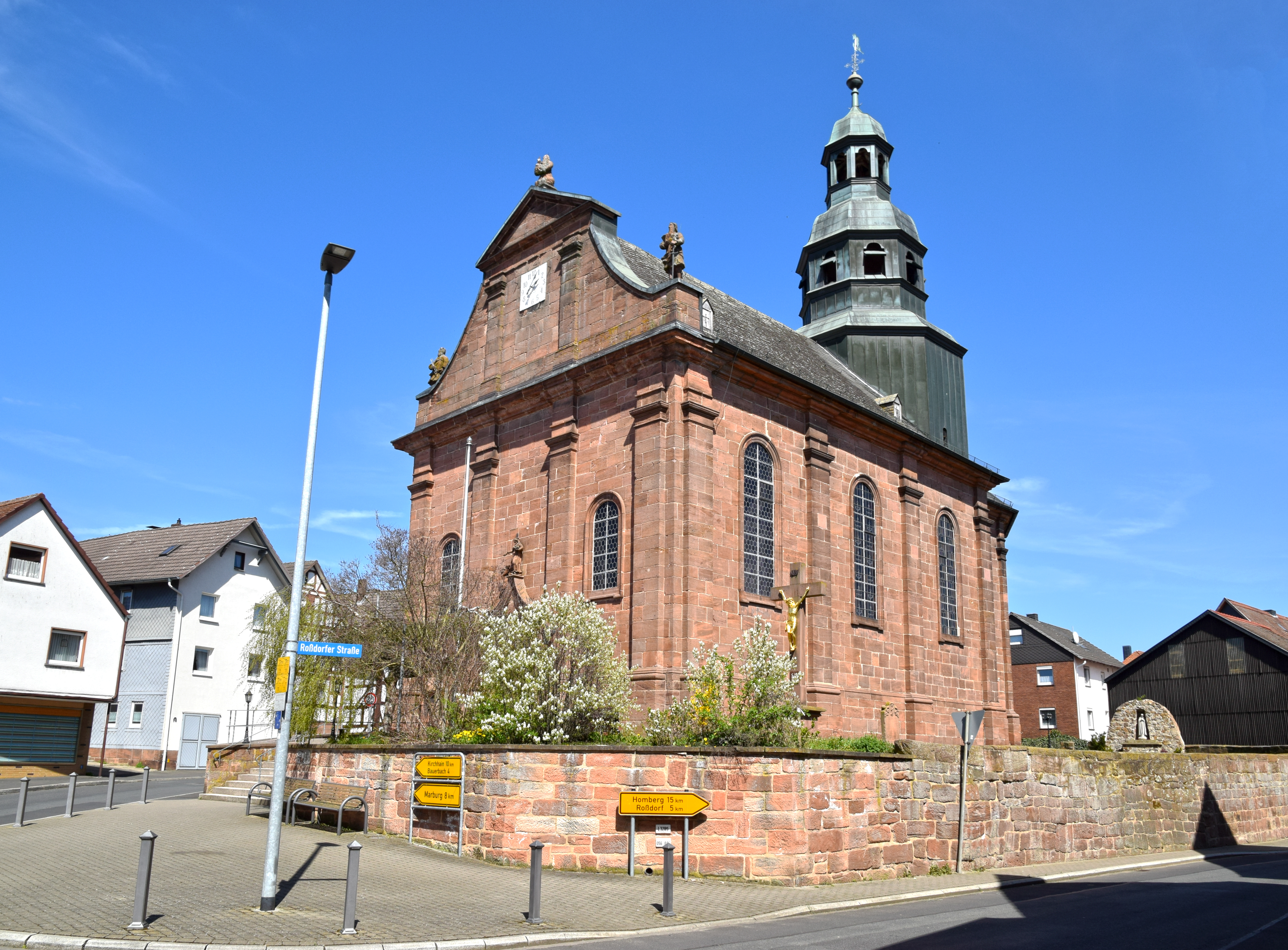 Die katholische Pfarrkirche St. Michael in Schröck (Marburg)